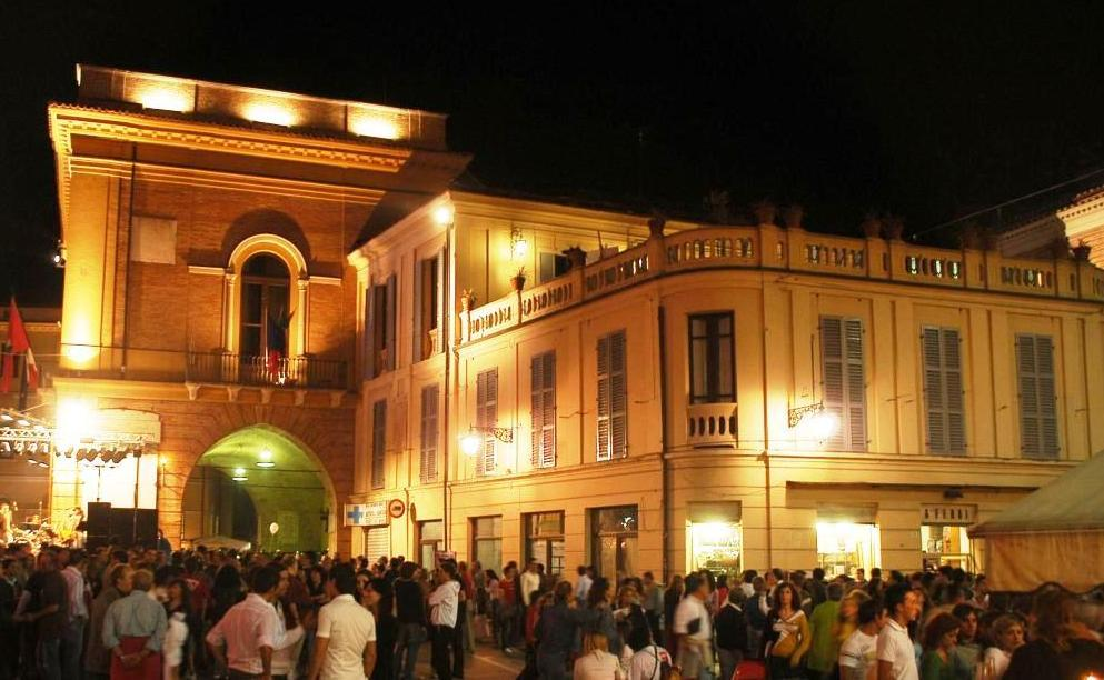 Palazzo del Municipio visto in notturna